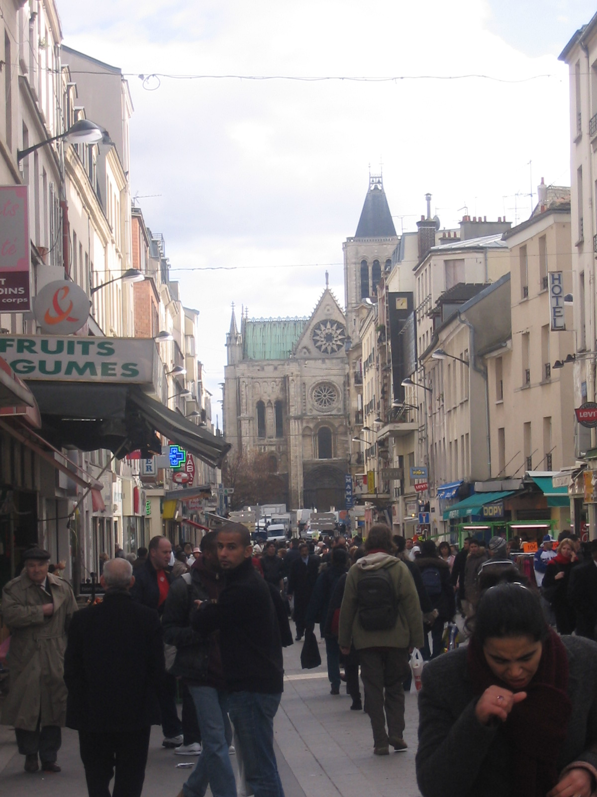 Rue de la République à Saint-Denis (93). Je suis l'auteur du cliché pris en 2005 Road "Rue de la République" in Saint-Denis (Seine-Saint-Denis). Licensing Catégorie:Saint-Denis (Seine-Saint-Denis)